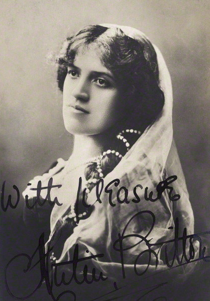 Hutin Britton